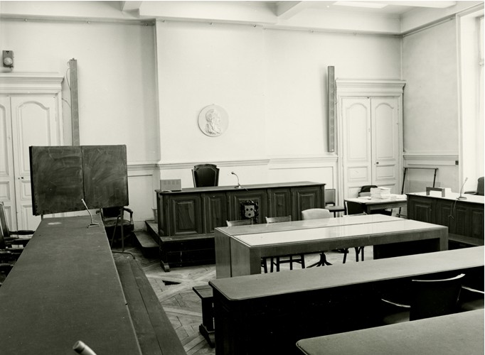 Salle du Conseil municipal de l’ancien Hôtel de Ville de Grenoble (Hôtel de Lesdiguières) avant 1967.